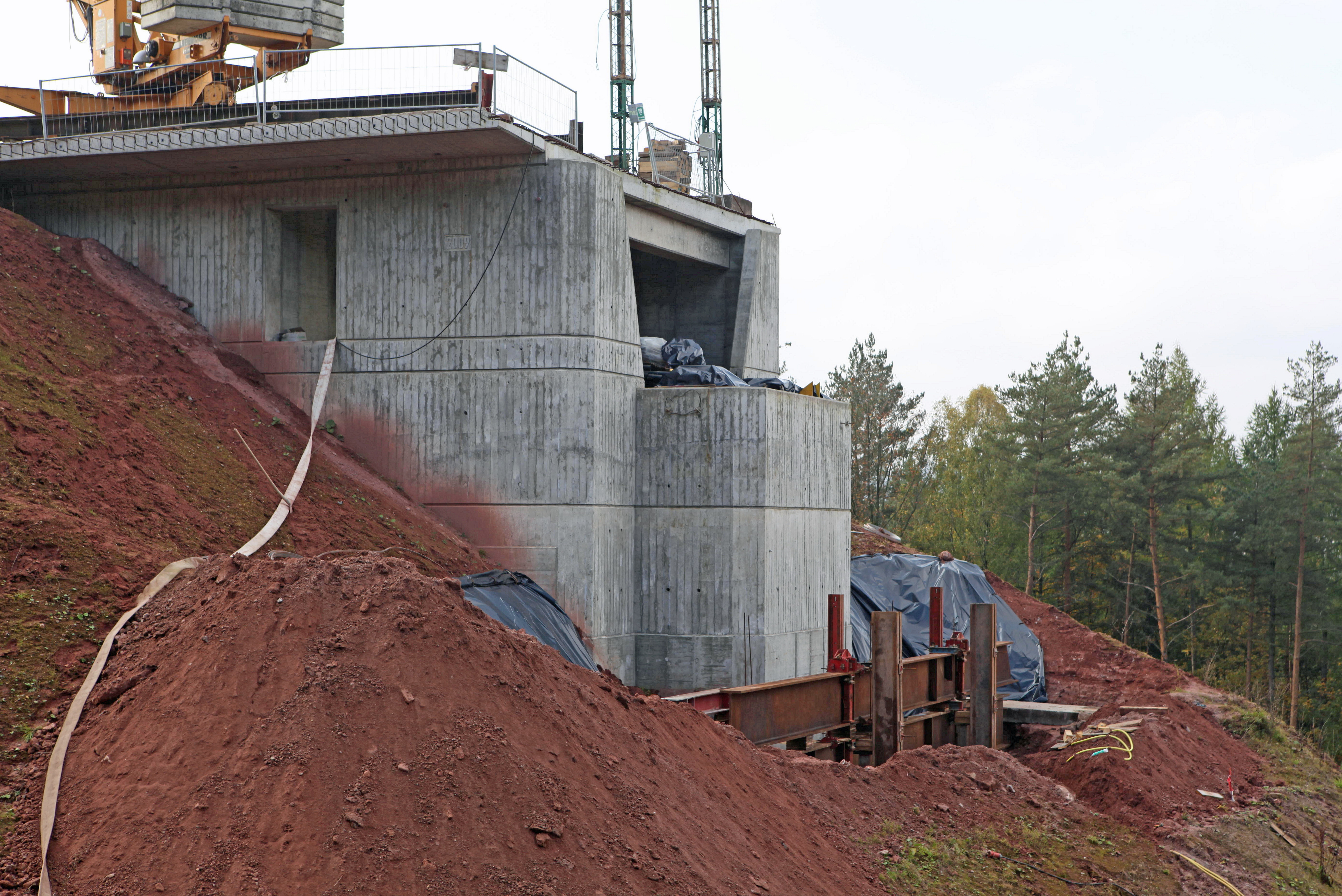 Westliches Widerlager Grümpentalbrücke bei Effelder-Rauenstein im Landkreis Sonneberg